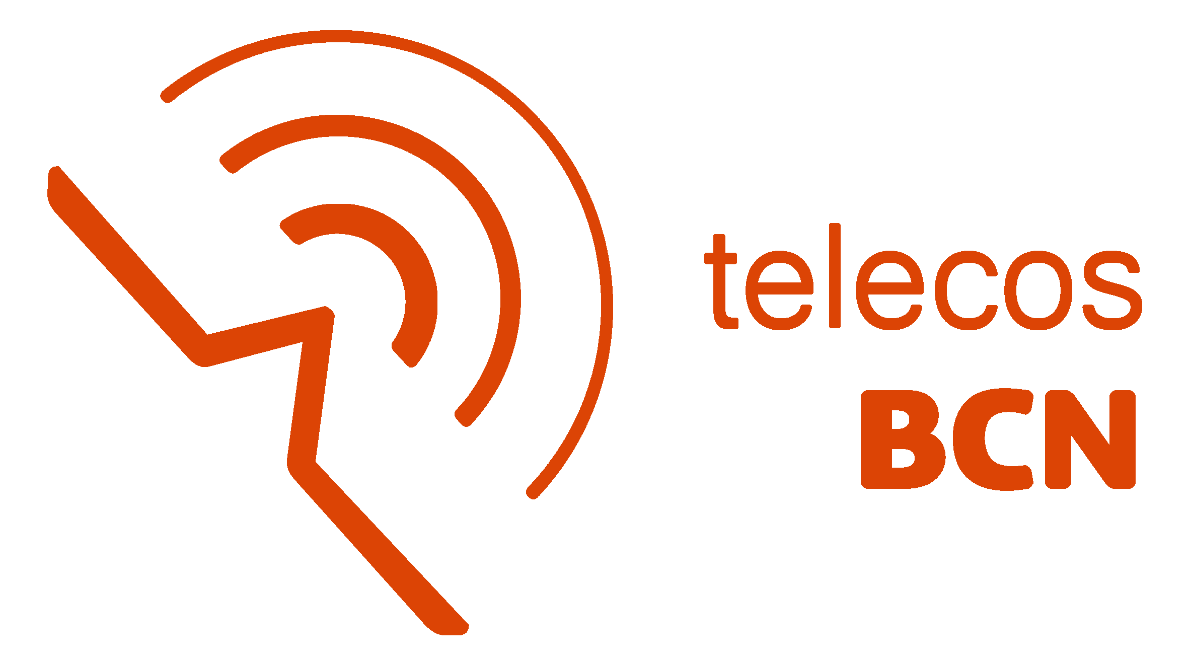 Logo telecos 2018